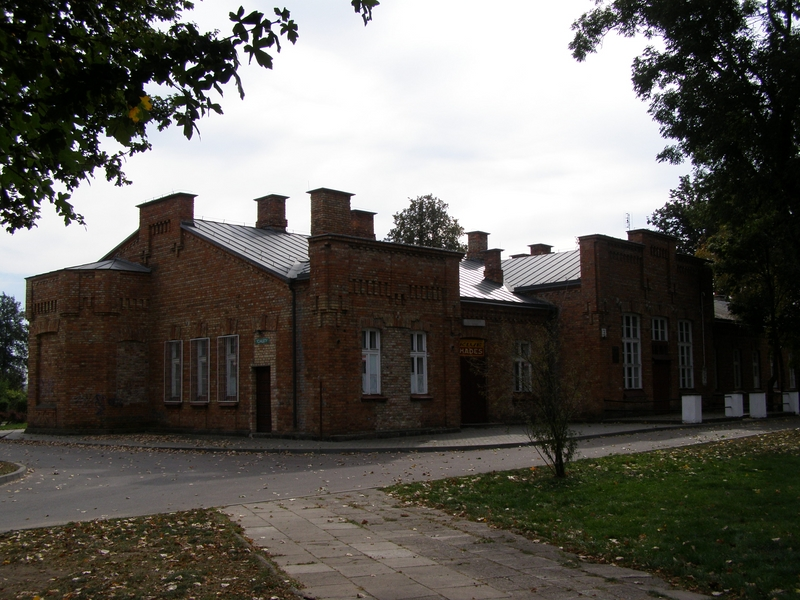 Grajewo - Klub Hades (dawniej budynek kasyna wojskowego) przy ul. Wojska Polskiego 01.2008.